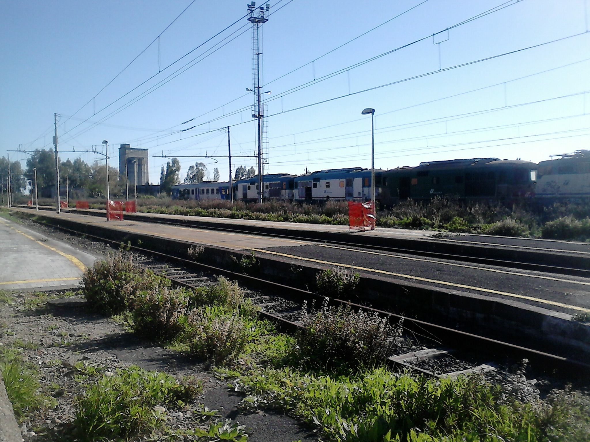 Stazione di Motta Sant'Anastasia, vista del piazzale da ovest, lato 1 binario